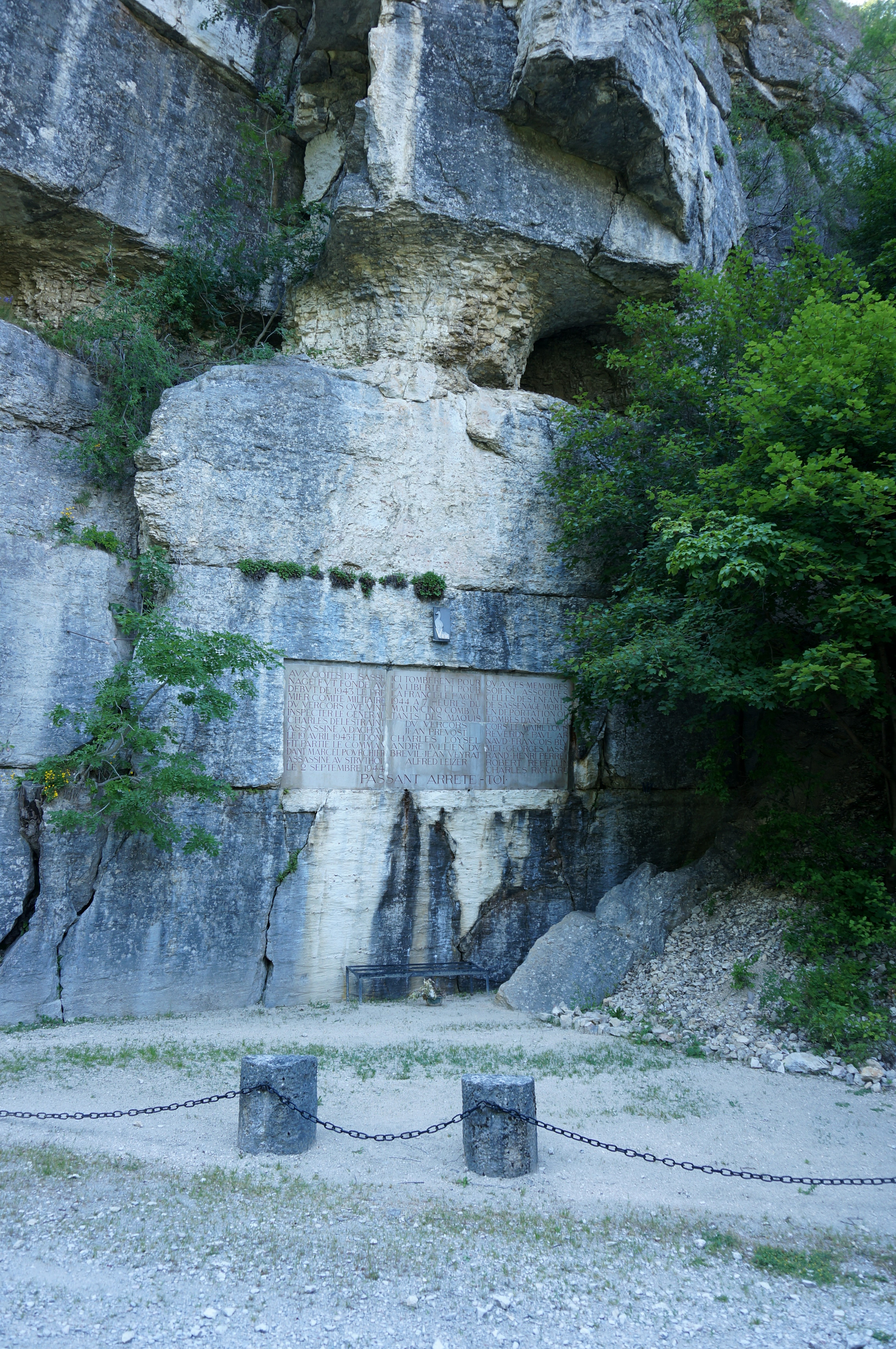 Mémorial en souvenir des combats du Vercors de juillet 1944.